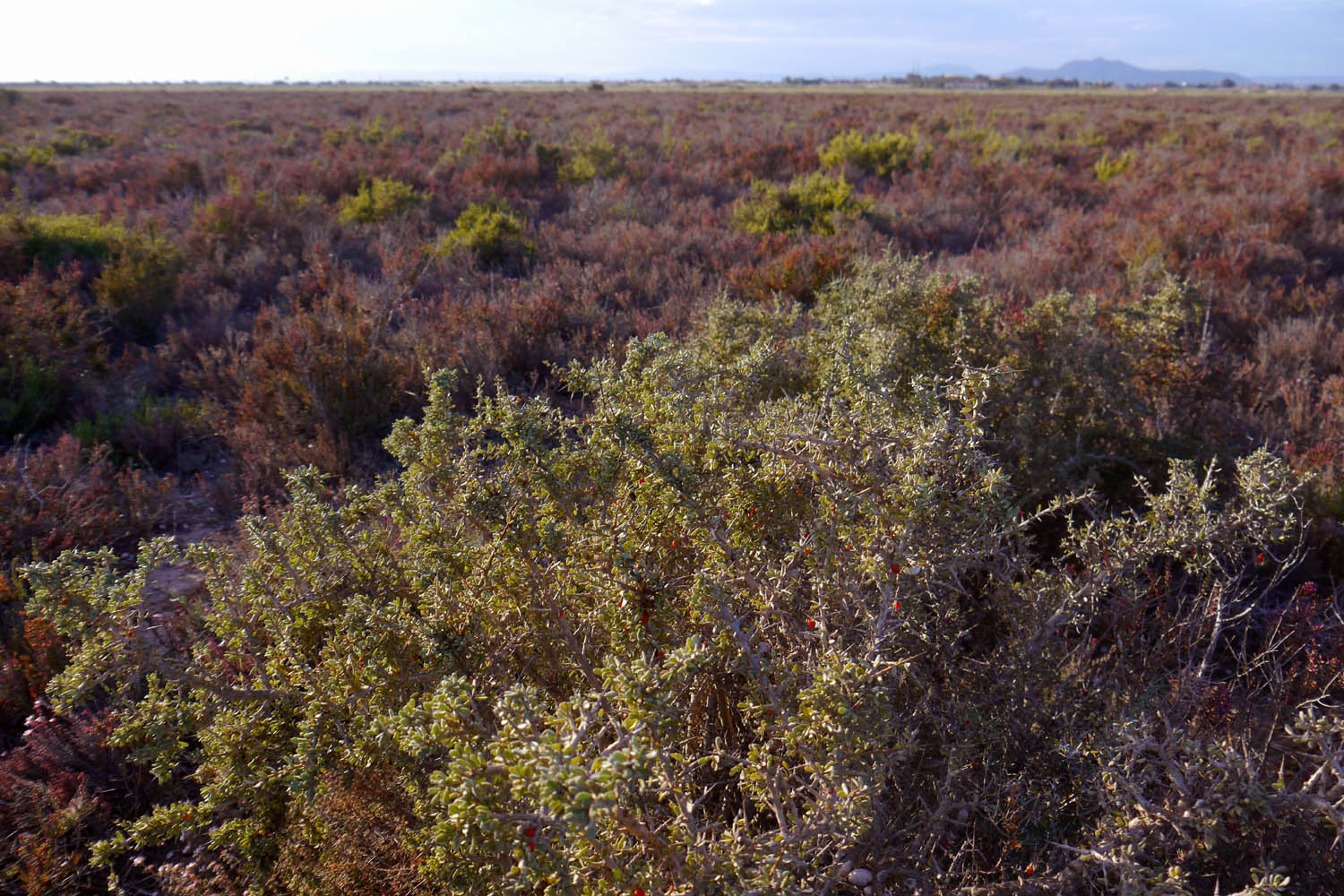 Saladar en la marina del Carmolí en el entorno del Mar Menor. Cartagena. España. En primer término un cambrón (Lycium intricatum).